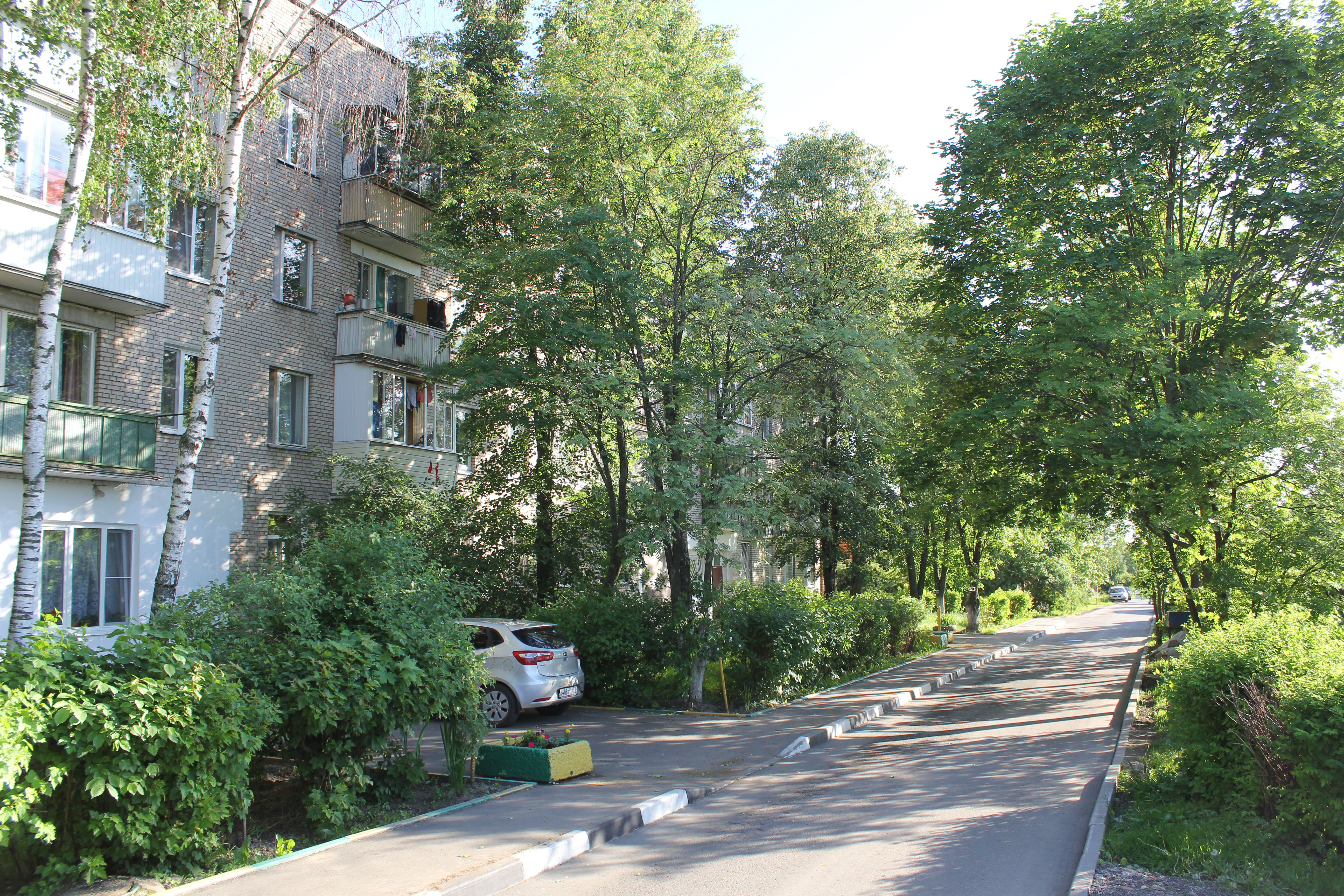 Многоквартирный дом в Валуево